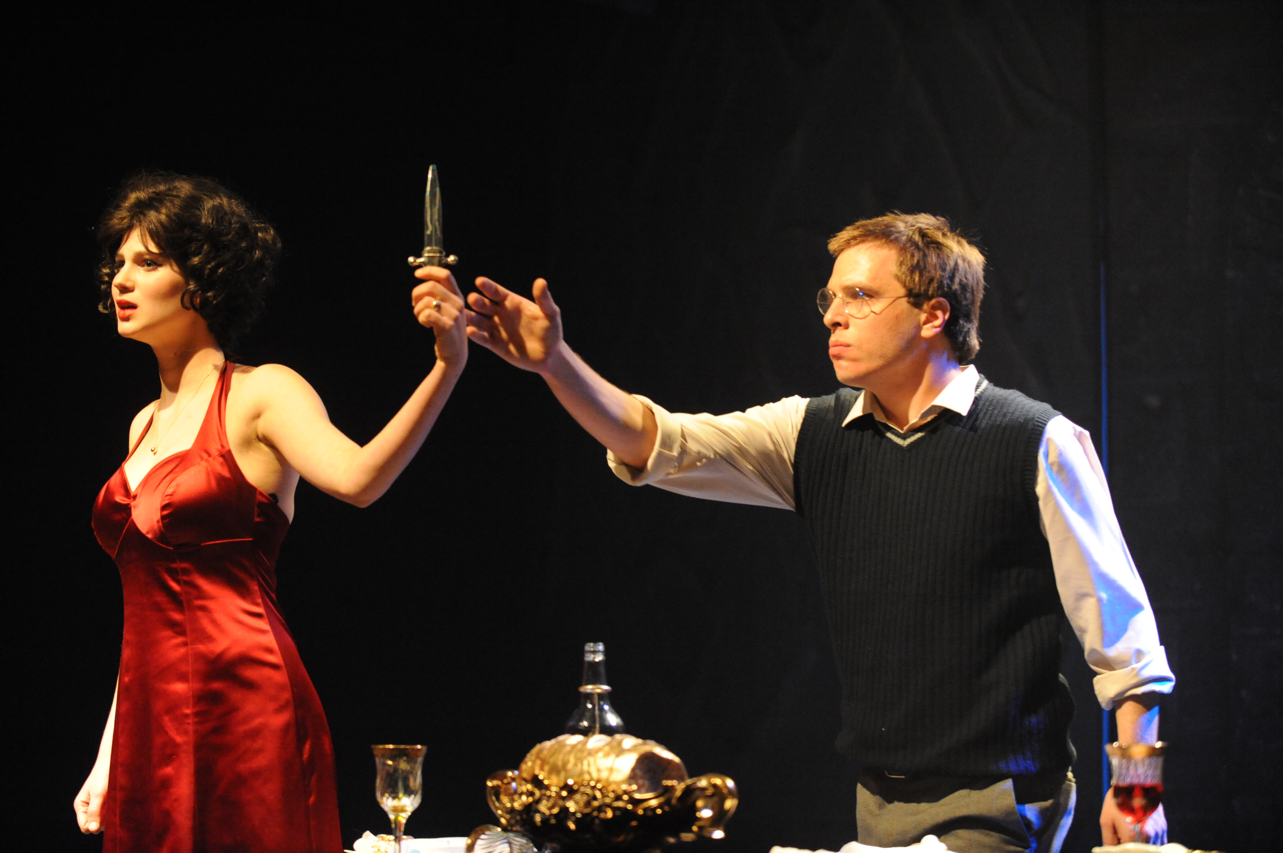 אודי רוטשילד ושמרית לוסטיג בהצגה "אהובת הדרקון", מאת ובבימויו של מיקי גורביץ', תיאטרון החאן